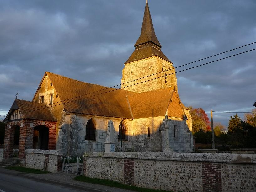 Eglise de Surtauville